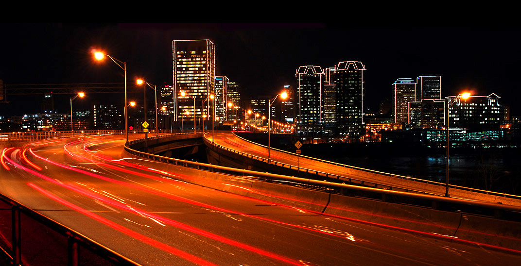 Skyline de Richmond